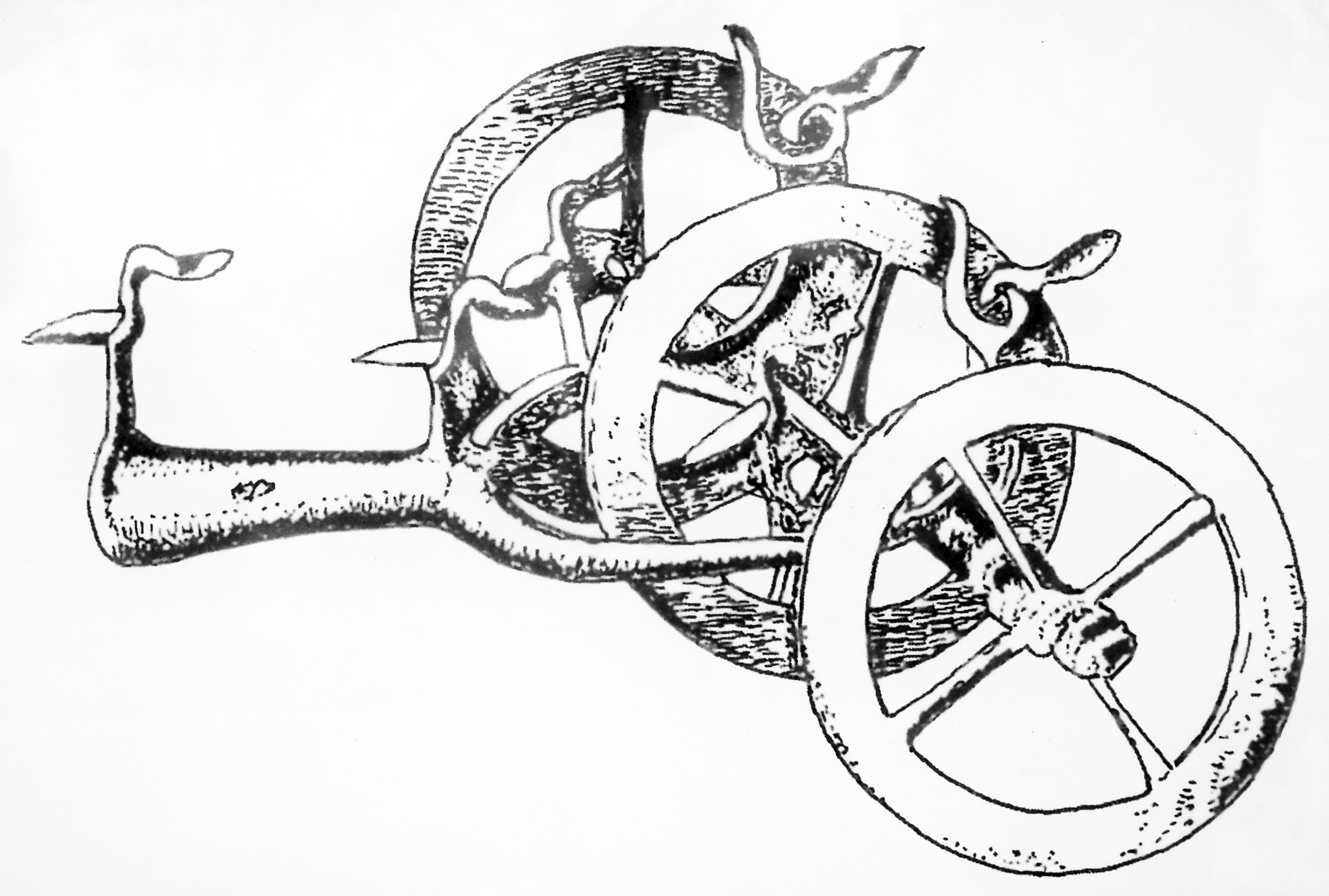 Wózek kultowy z Ośna Lubuskiego. Tablica inf. na rynku w Ośnie Lub.